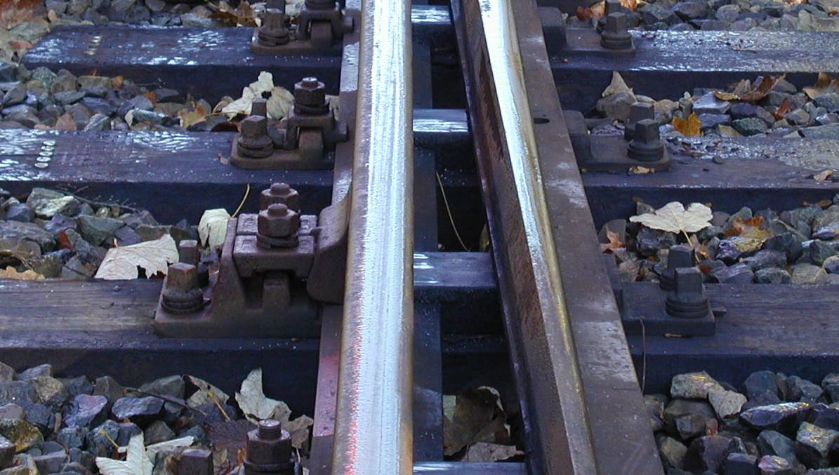 Keilverspannte Schienenstuetze Bauart M